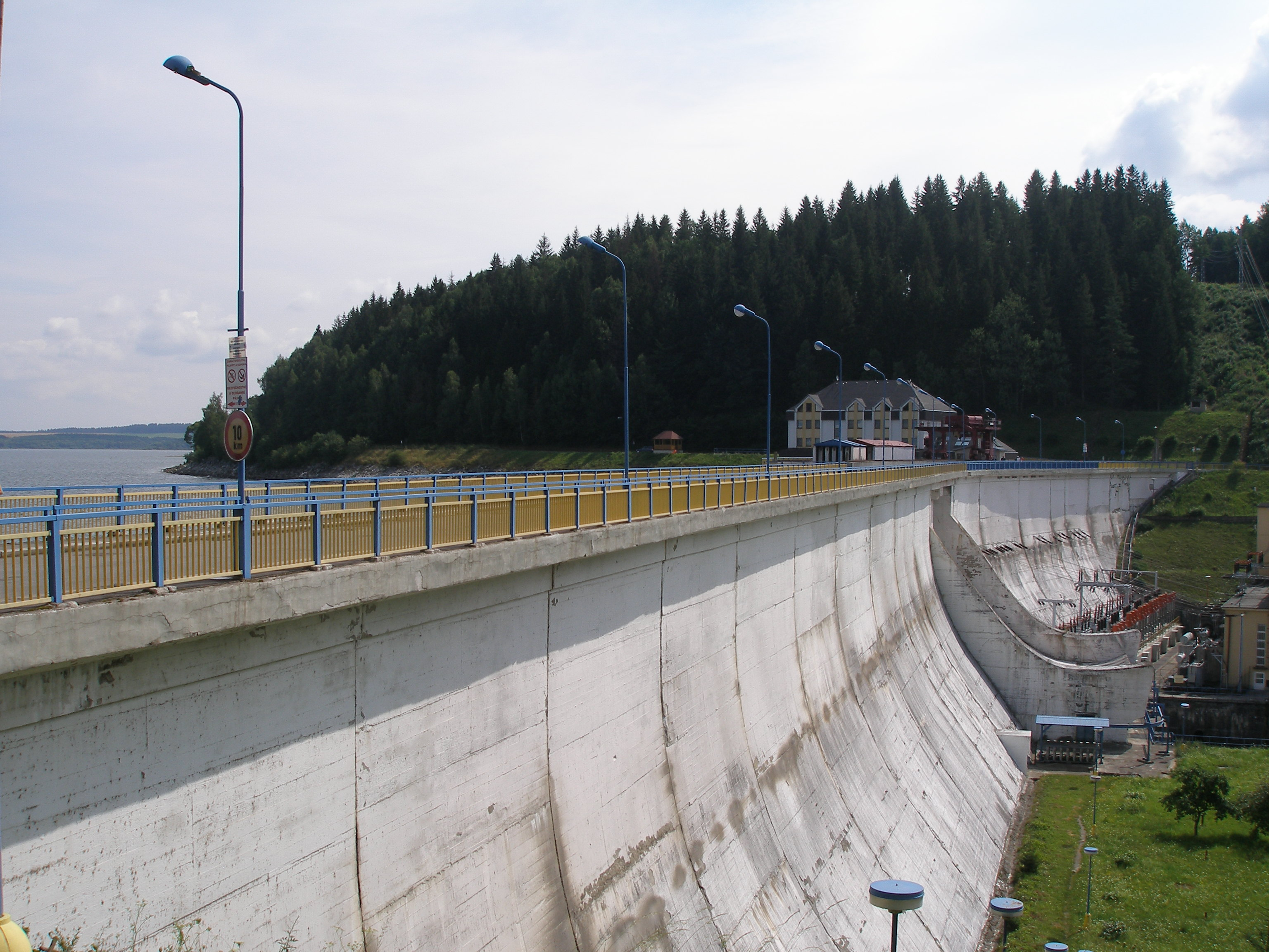 Vodné dielo Oravská priehrada, región Orava okr.Tvrdošín